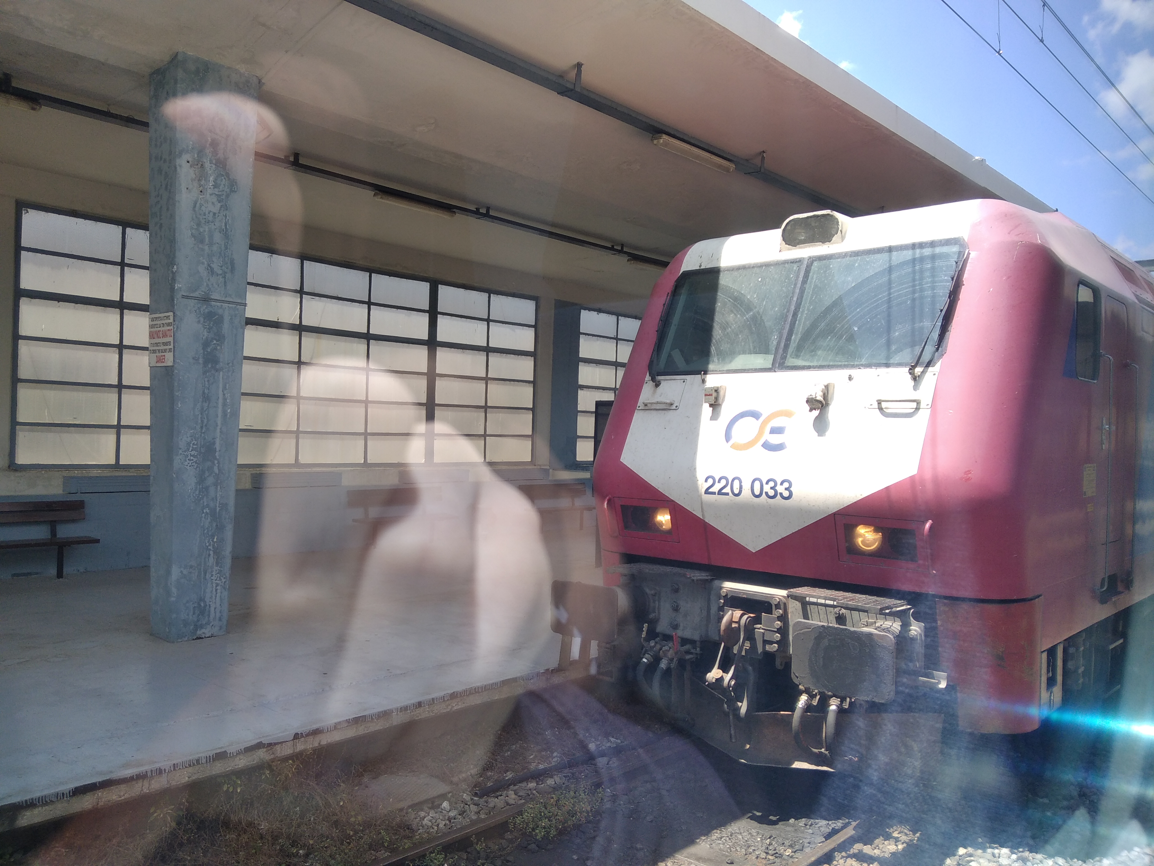 ADtranz-Bombardier DE 2000 (220 033) Θεσ/νίκη Ιούνιος 2020